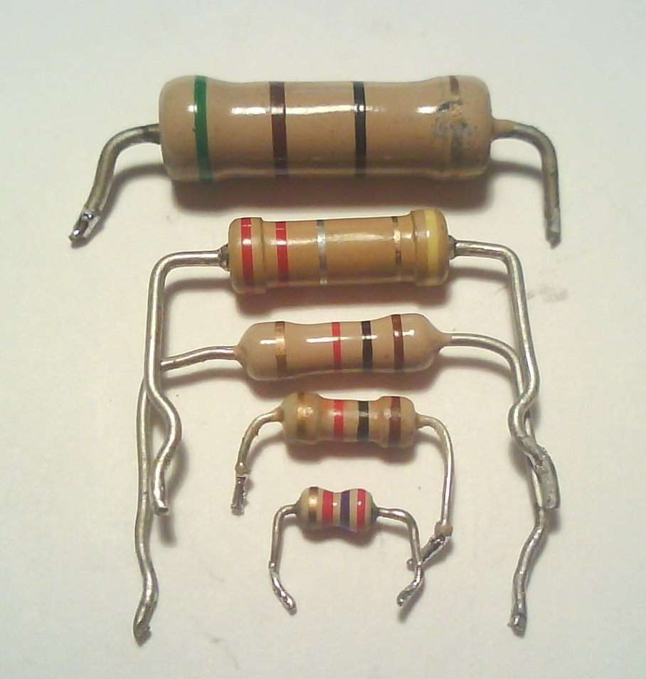 Kurdî: Tirûş